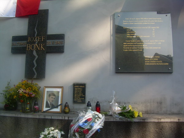 Pamätník obetiam okupácie 21. augusta 1968 v Poprade